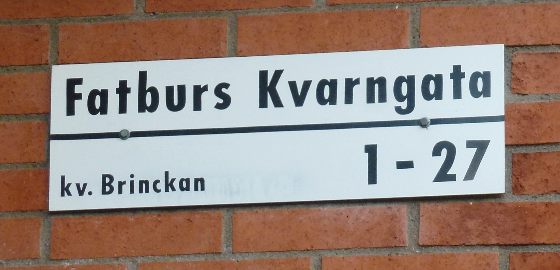 Gatuskylt "Fatburs Kvarngata"